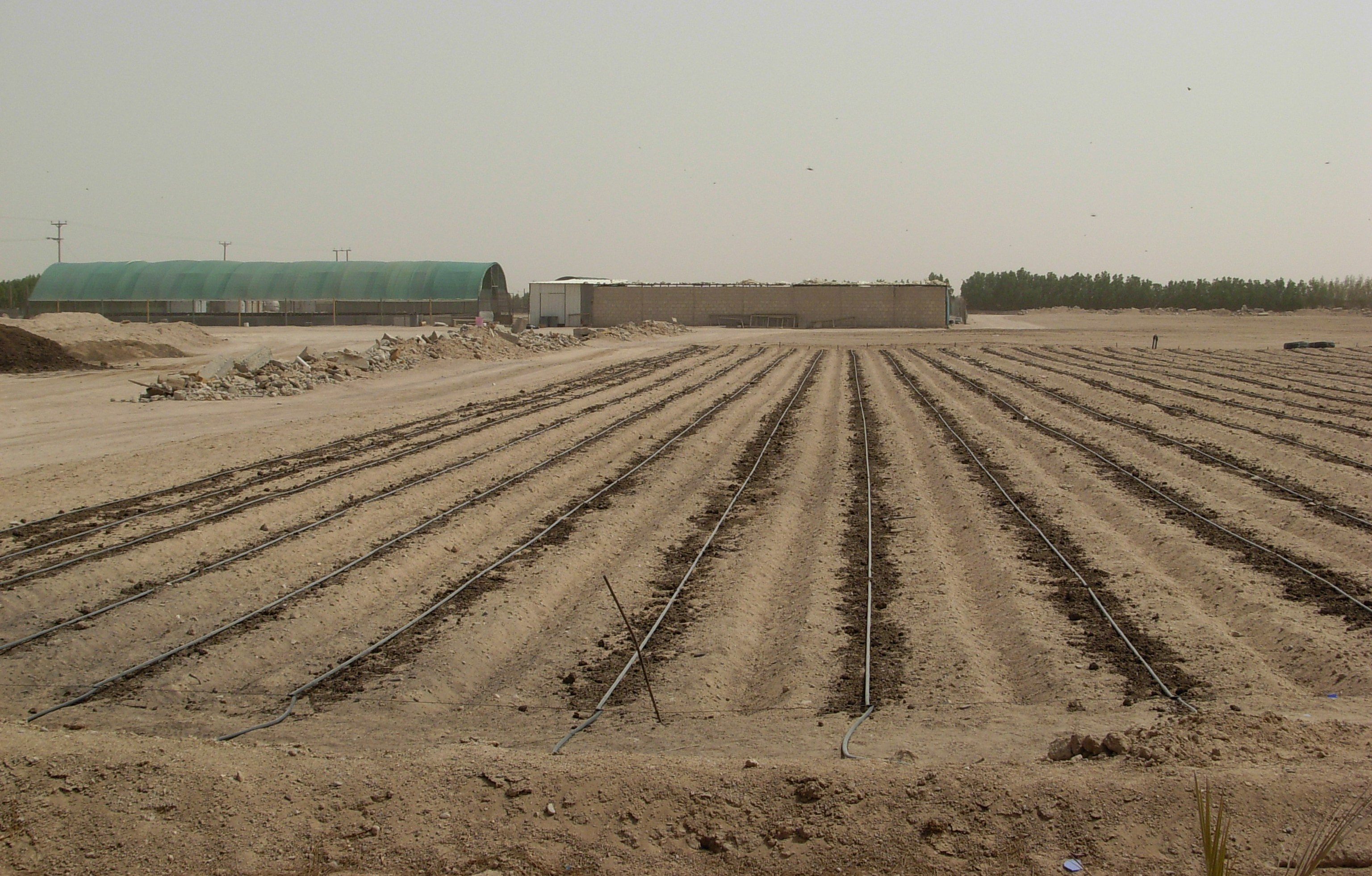 കുവൈറ്റിലെ ഒരു കൃഷിയിടത്തിൽ നിലമൊരുക്കിയിരിക്കുന്നു. ജലലഭ്യത എപ്പോഴുമുറപ്പാക്കാൻ കുഴലുകൾ സ്താപിച്ചിട്ടുണ്ട്. വിത്തുകൾ പാകിമുളപ്പിക്കുതിനും മറ്റുമുള്ള ഗ്രീൻ ഹൗസും കാണാം. Location : - കുവൈറ്റ് - ഇറാക്ക് അതിർത്തിക്കടുത്തുള്ള അബ്ദലി ഫാം.